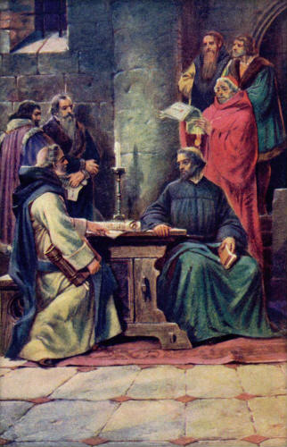 Kamil Vladislav Muttich - Poslední vyzvání mistru Husovi ku podepsání odvolací formule v den před upálením 5. července 1415